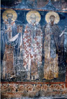 Фреска в охридската църква "Стари Свети Климент".